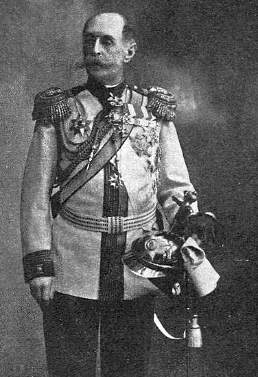 Фредерикс Владимир Борисович